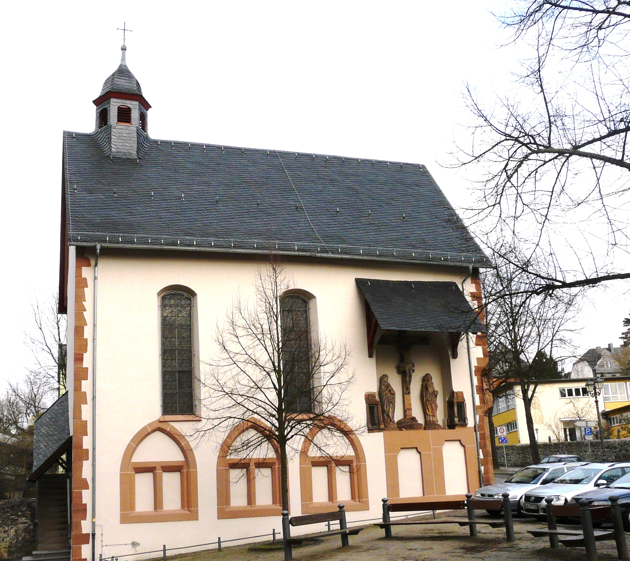 Die Michaelskapelle in Wetzlar (Hessen) diente als Kerner des Wetzlarer Doms.